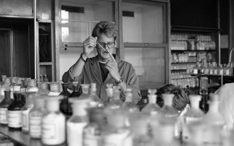 Juni 1988 Frankfurt am Main, Hoechst AG (Chemiewerk)